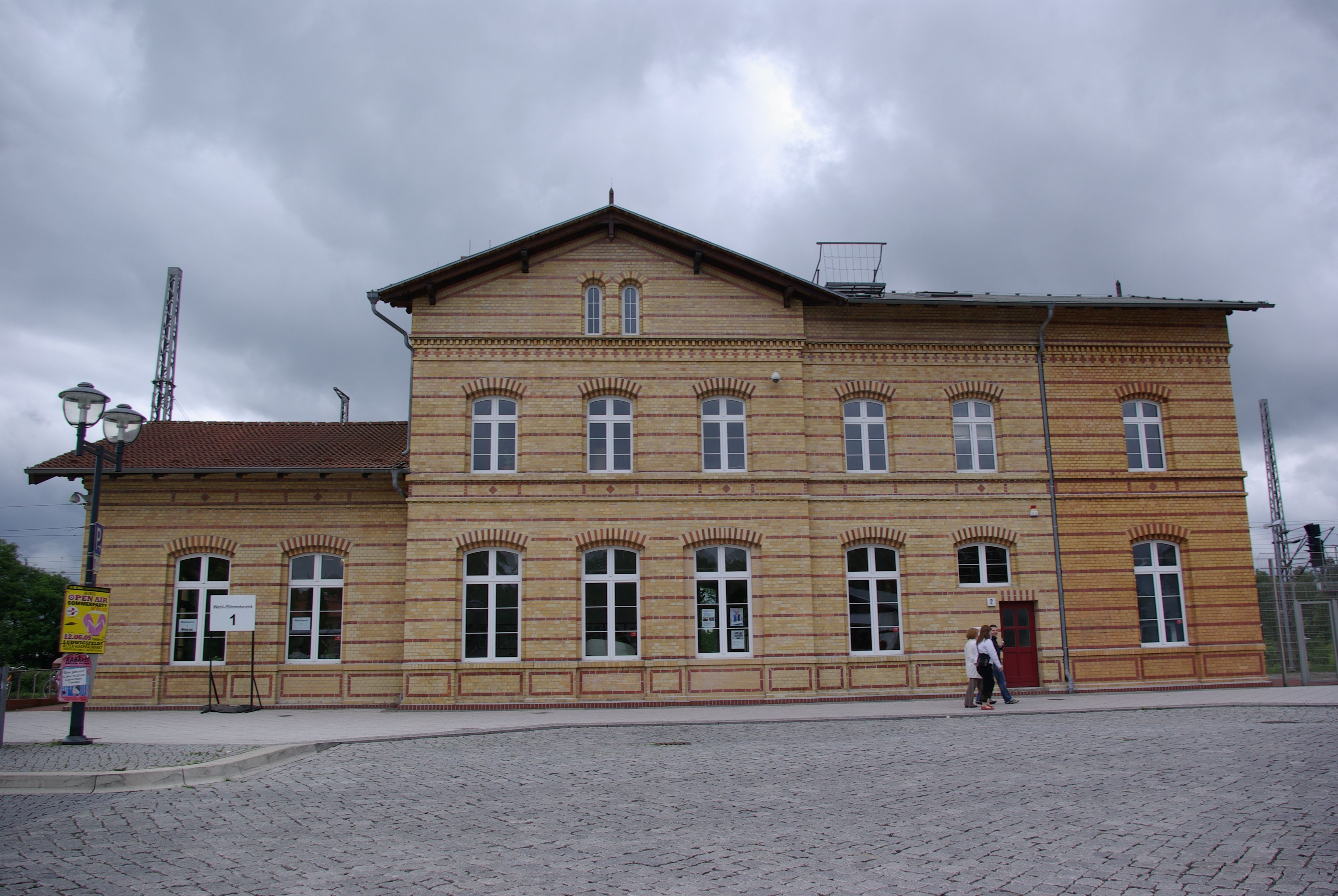 Ludwigsfelde in Brandenburg. Der Bahnhof steht unter Denkmalschutz. Im Gebäude befindet sich ein Museum.